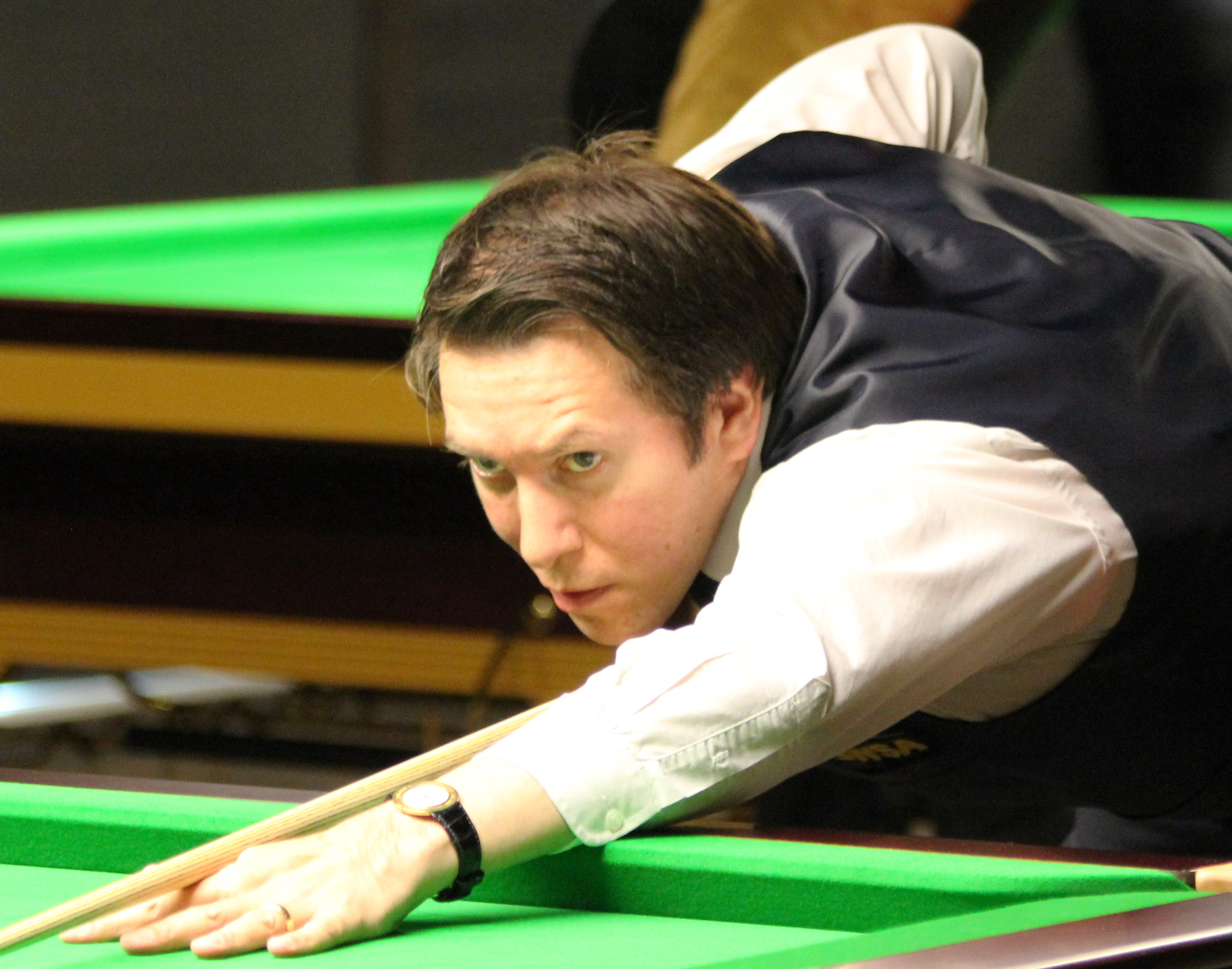 Dominic Dale beim Paul Hunter Classic 2012